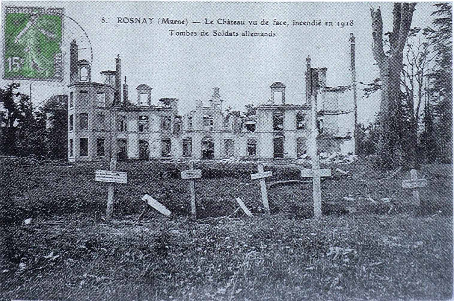 Château_de_Rosnay, vue des dégats_de_guerre.